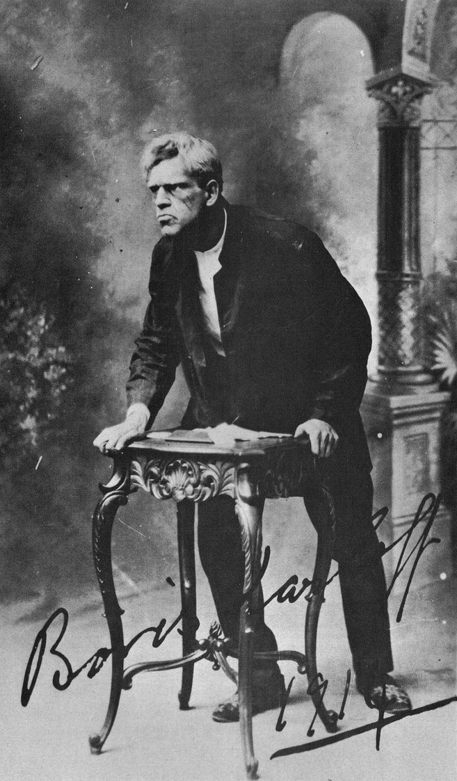 Борису Карлоффу 26 лет, в постановке Гарри Сент-Клера «Заплатить сполна» 1914 года.